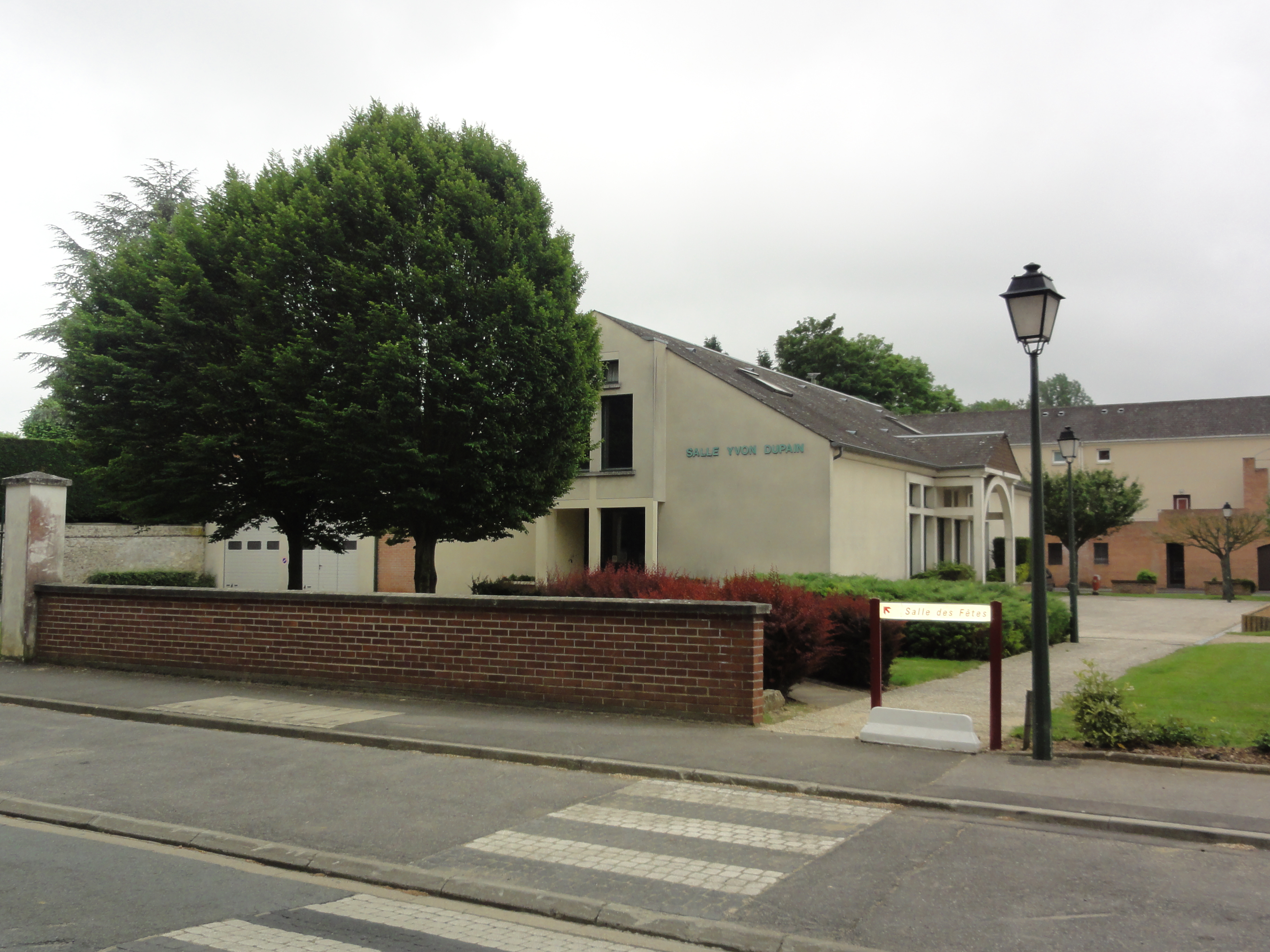 Le Meux (Oise) Salle des fêtes